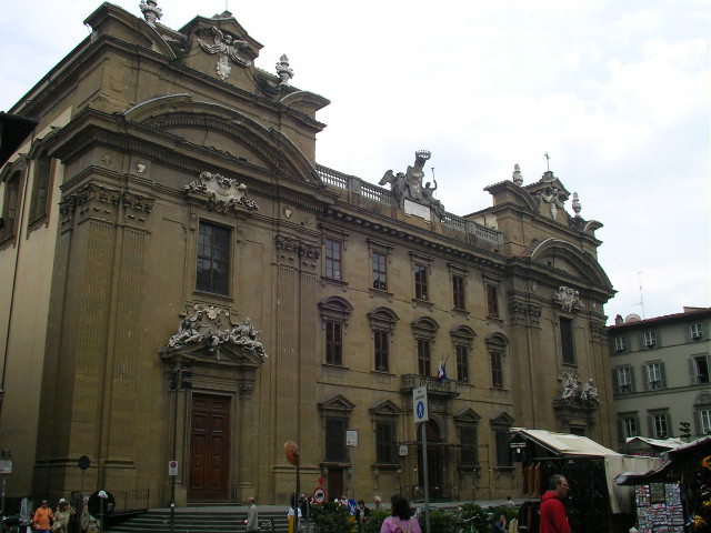 San Firenze tribunal, San Filippo Neri church facade in Florence, Italy